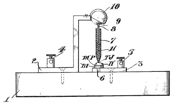 Полупроводниковый детектор Пикара, 1906